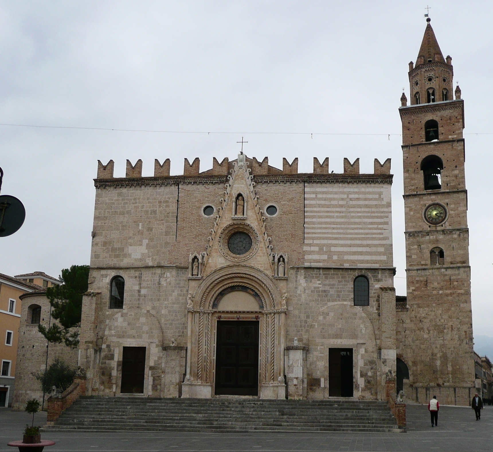 Duomo di Teramo - facciata principale